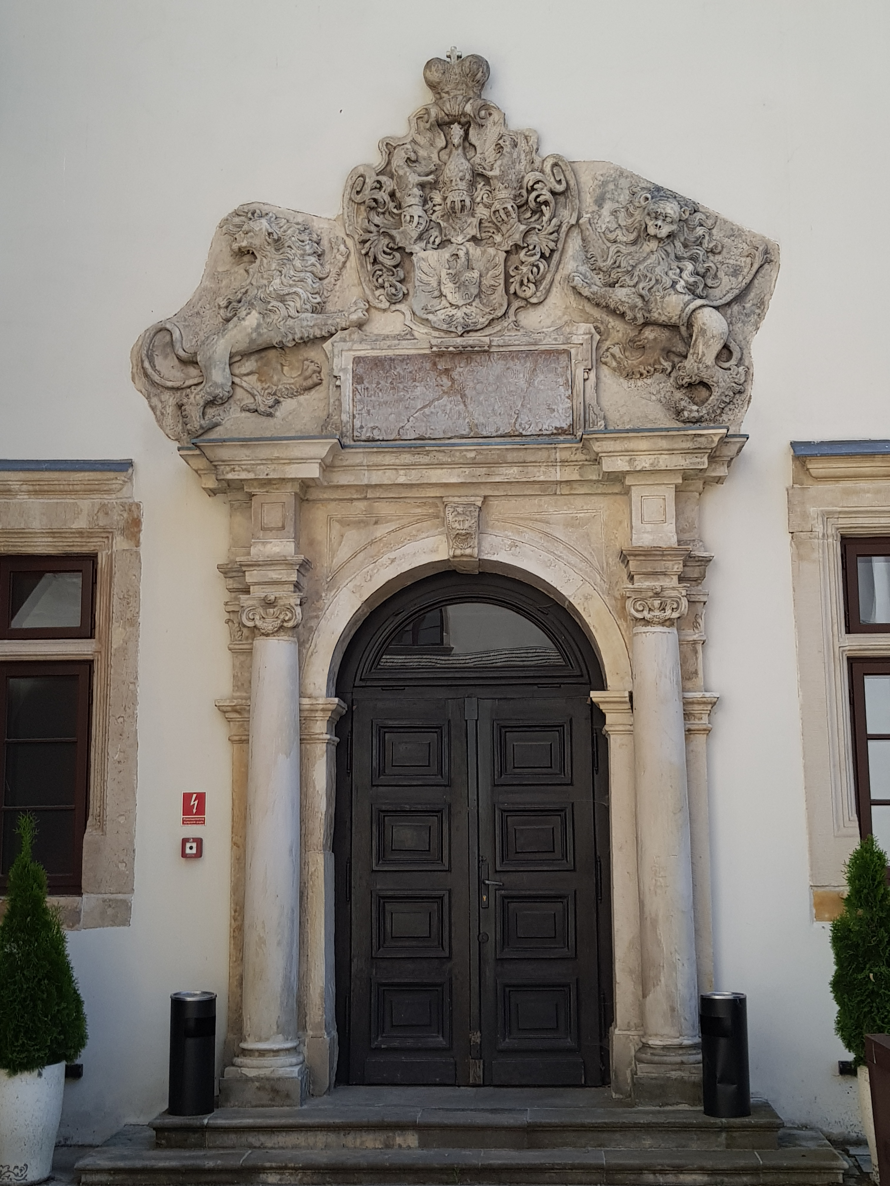 Portal na zamku w Szydłowcu